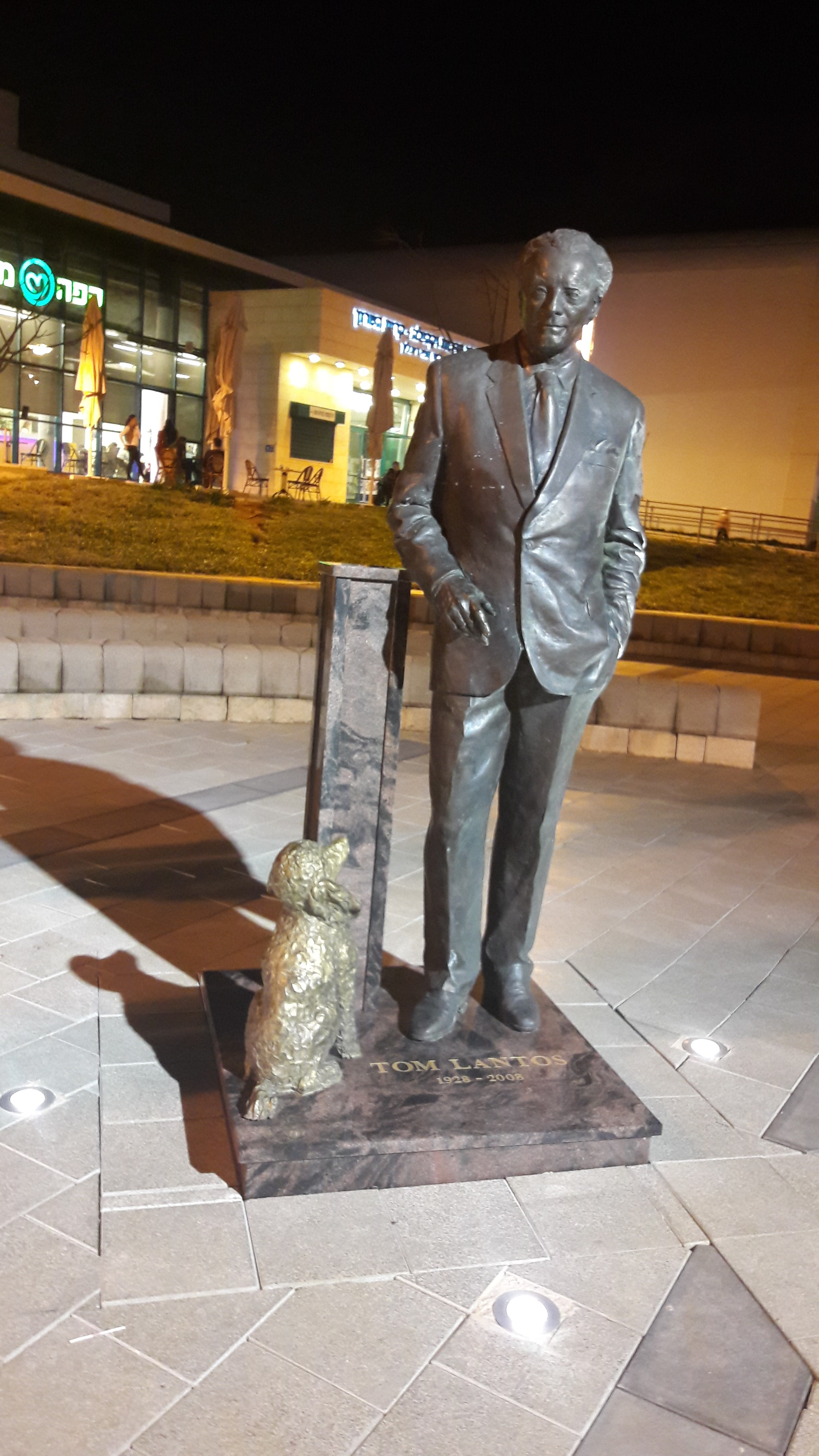 פסל של טום לנטוס, נתניה